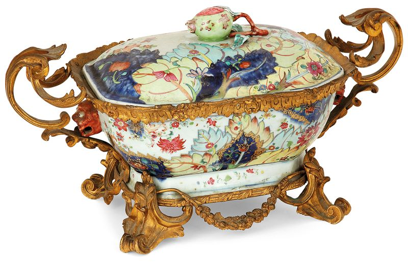 Chine-terrine-rectangulaire-epoque Qianlong